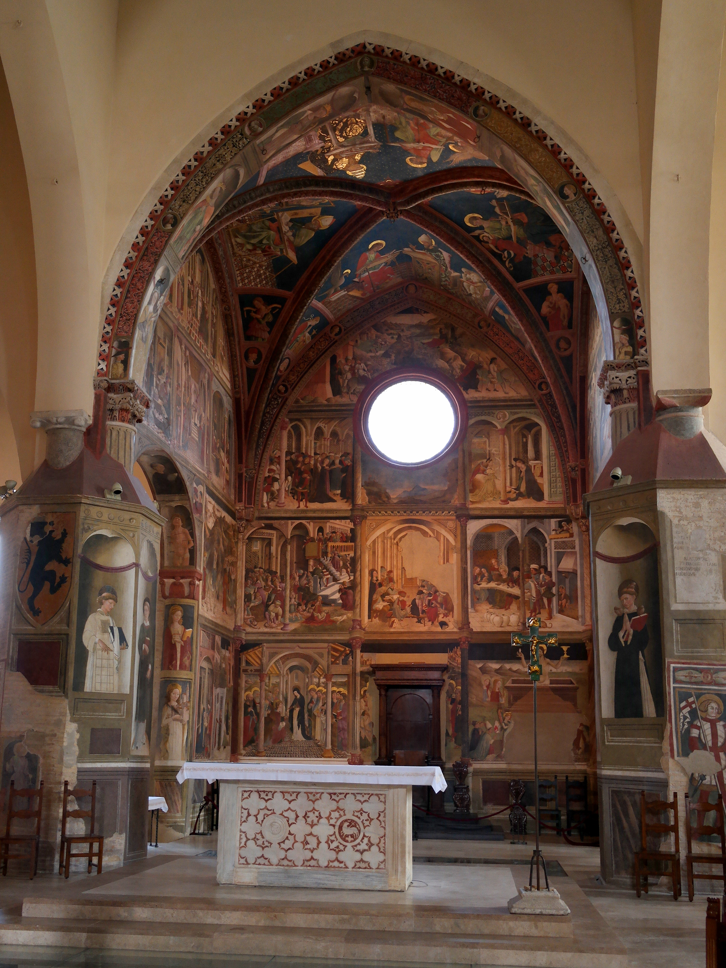 Coro del Duomo di Atri, affrescato da Andrea de Litio